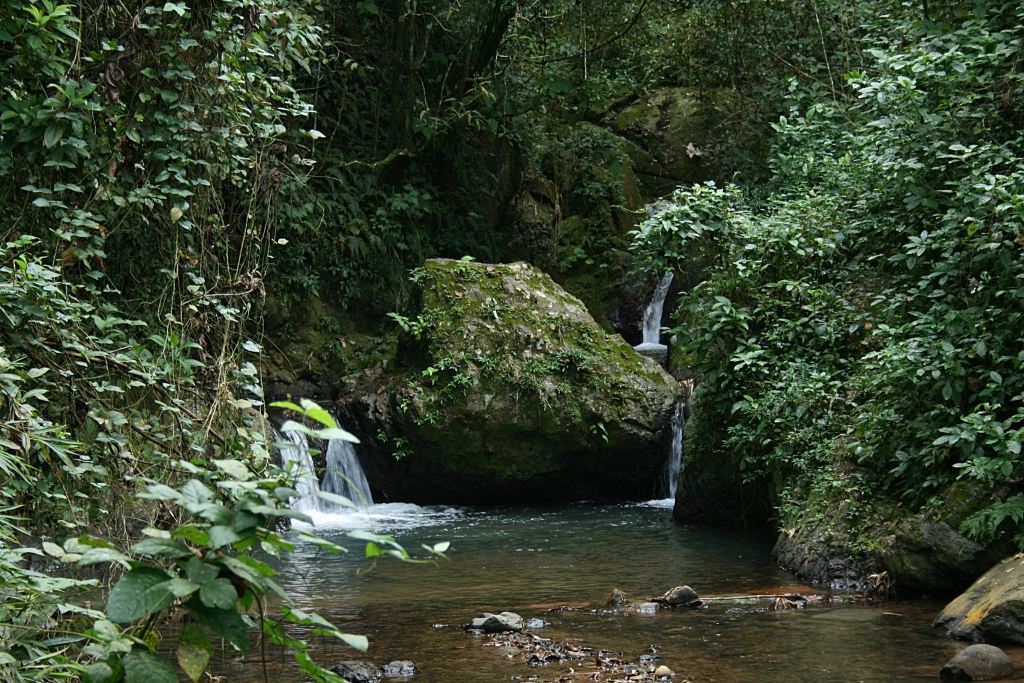 Water stream at Monte del Estado (Maricao State Forest). Maricao, Puerto Rico